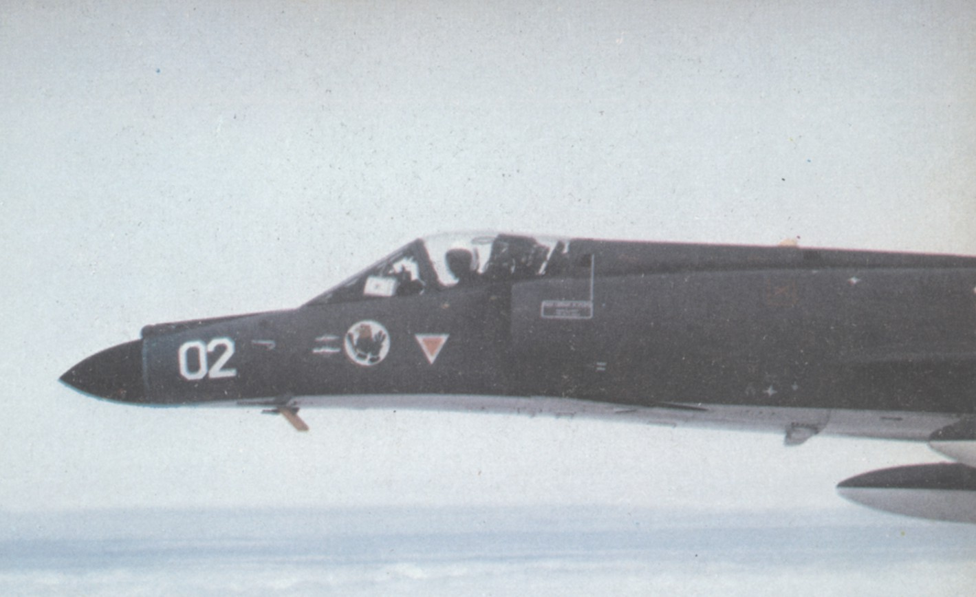 Avión Super Etendart en vuelo. La aeronave de la foto participó en el ataque al destructor HMS Sheffield y al portacontenedores Atlantic Conveyor. Este avión resultó destruído en un accidente operativo en el año 1999.